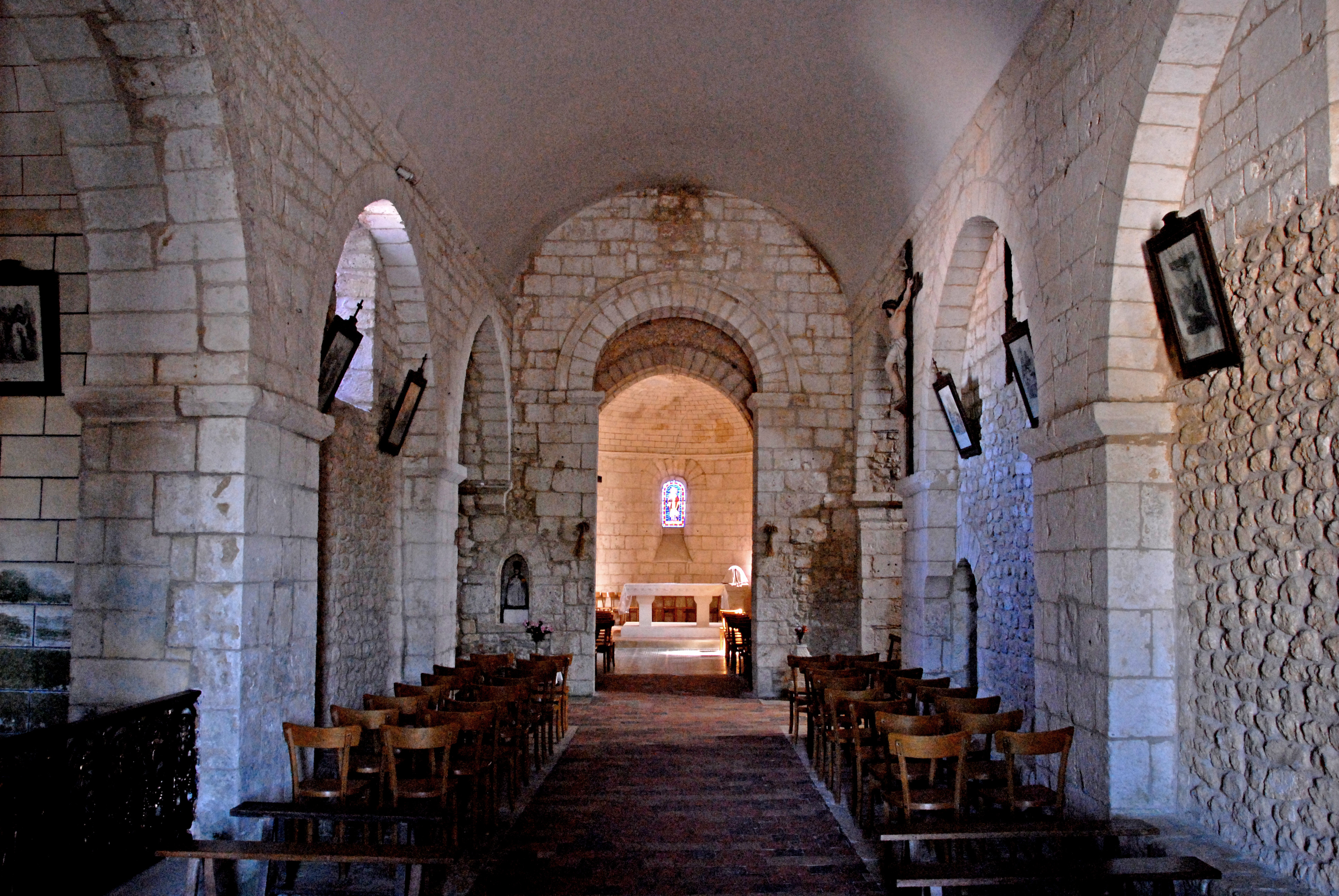 Saint-Bris-de-Bois, Schiff, vom Eingang zum Chor, Bruchstein des Ursprungsbauwerks